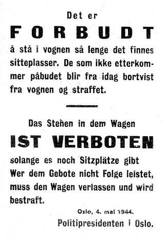 "Det er forbudt å stå i vognen så lenge det finnes sitteplasser. De som ikke etterkommer påbudet blir fra i dag bortvist fra vognen og straffet. Oslo, 4. mai 1944 – Politipresidenten"